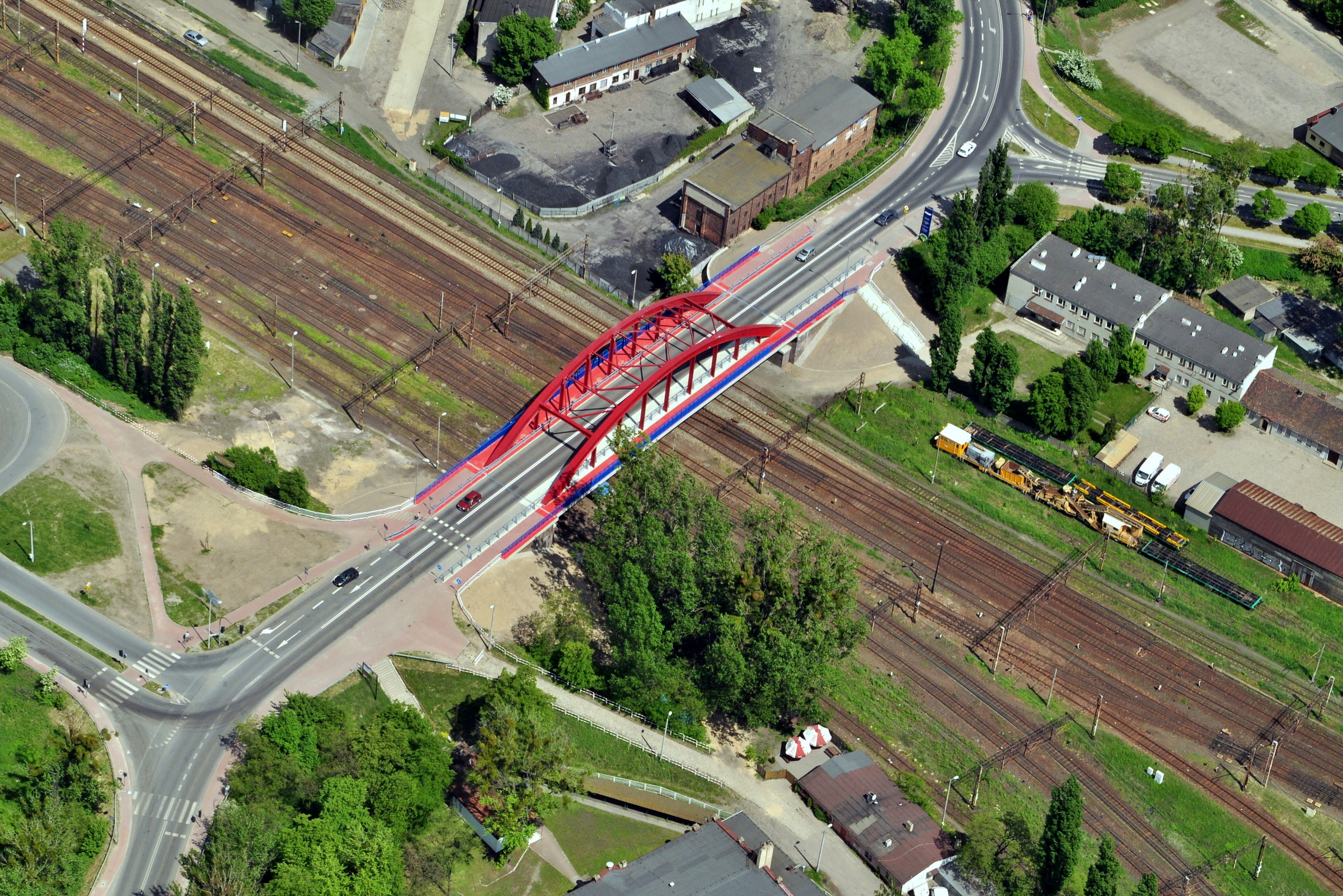 Ostrów Wlkp. Droga wojewódzka nr 445 z wiaduktem odolanowskim